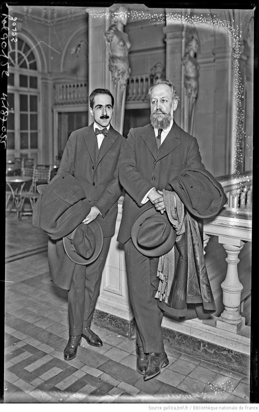 Xavier de Courville